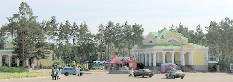 Вход в парк с улицы Киевской.